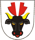 Znak obce Turovice